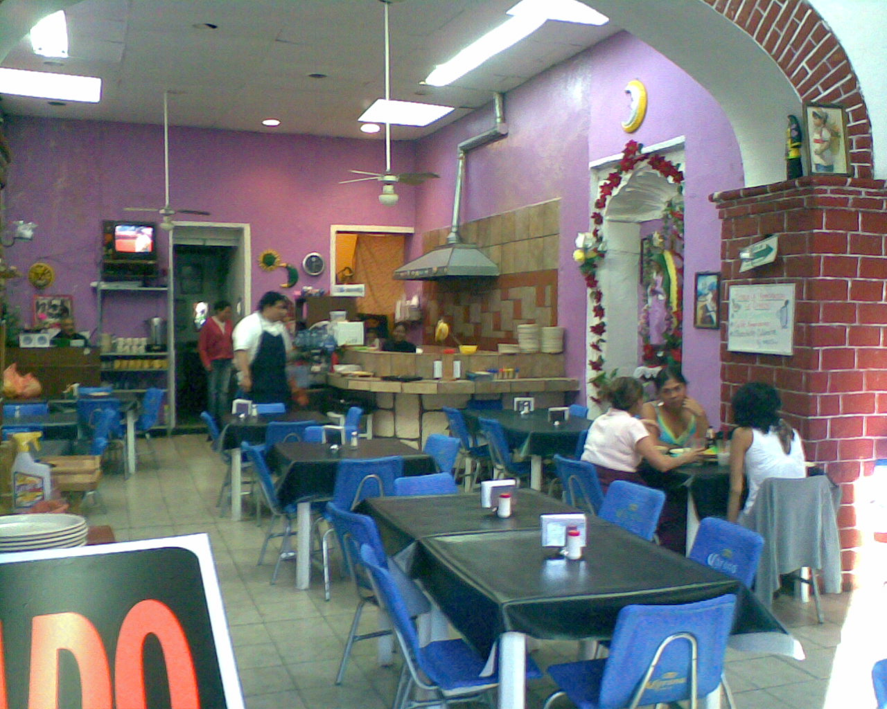 Fonda típica mexicana, Tlalpán, Ciudad de México